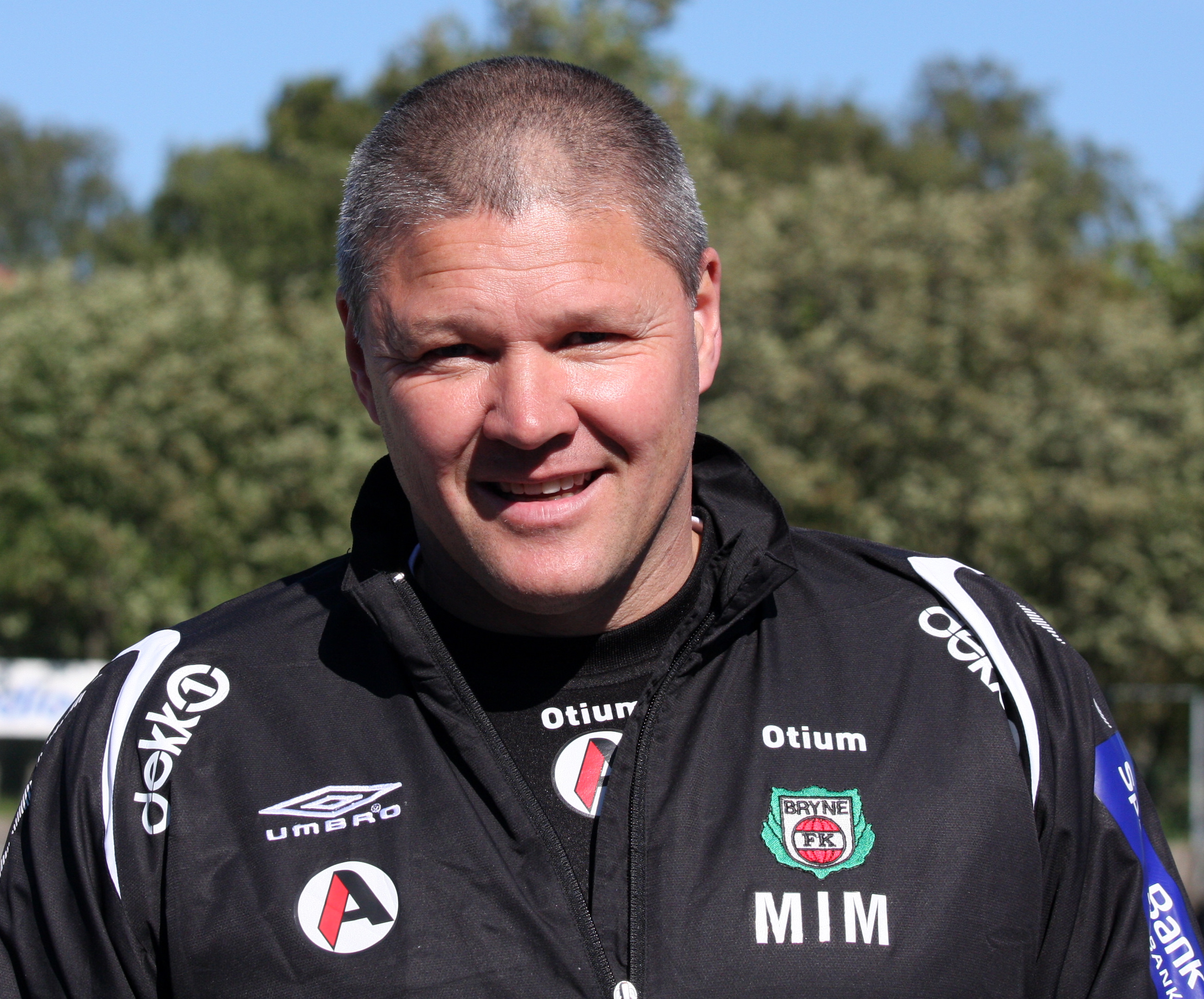 Mons_Ivar_Mjelde at Bryne stadion